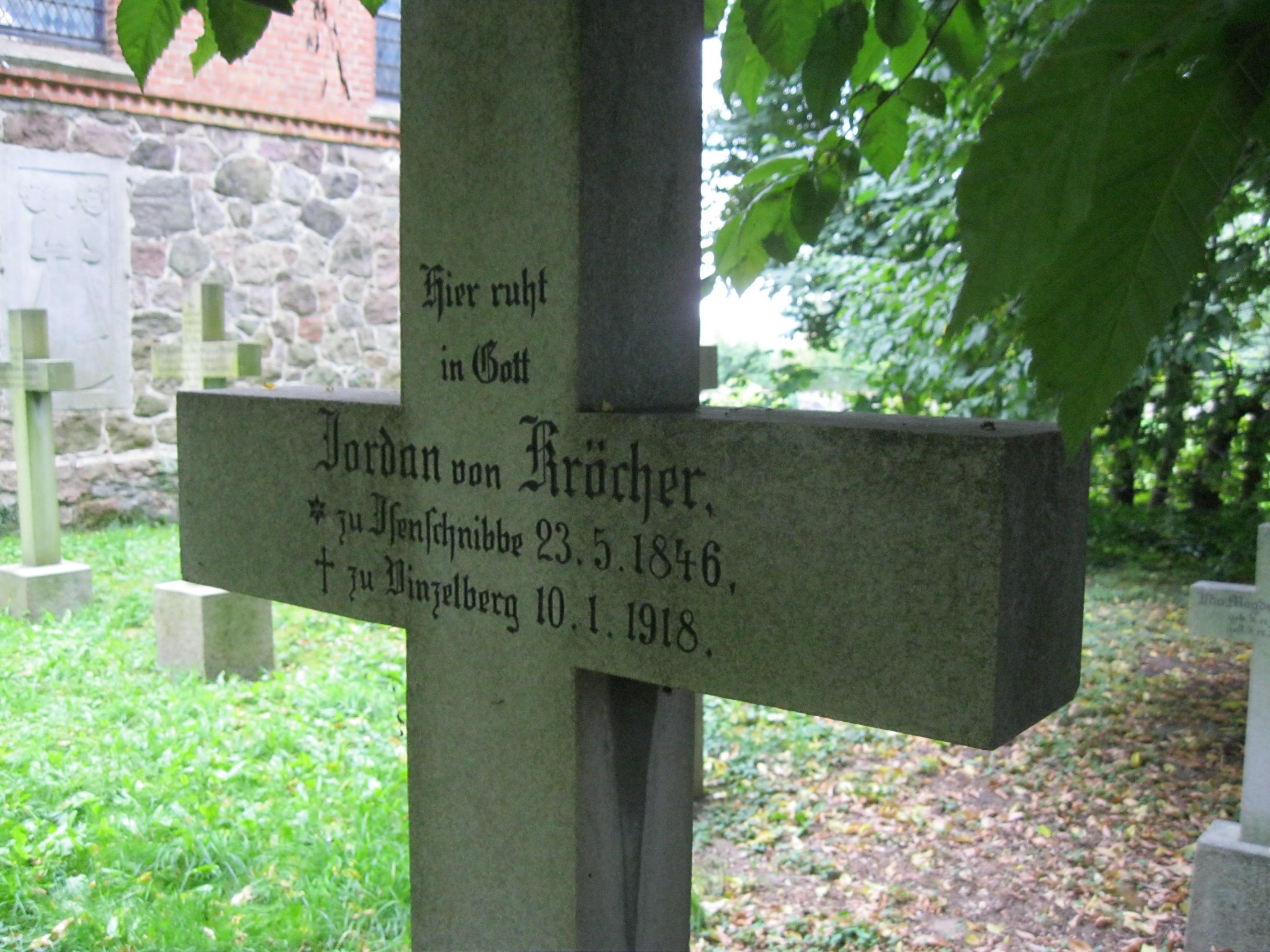 Grabstein des Jordan von Kröcher